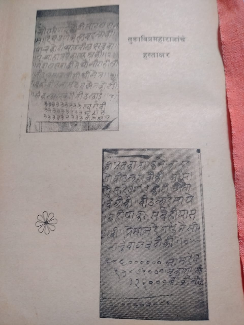 संत तुकाविप्र यांचे हस्ताक्षर